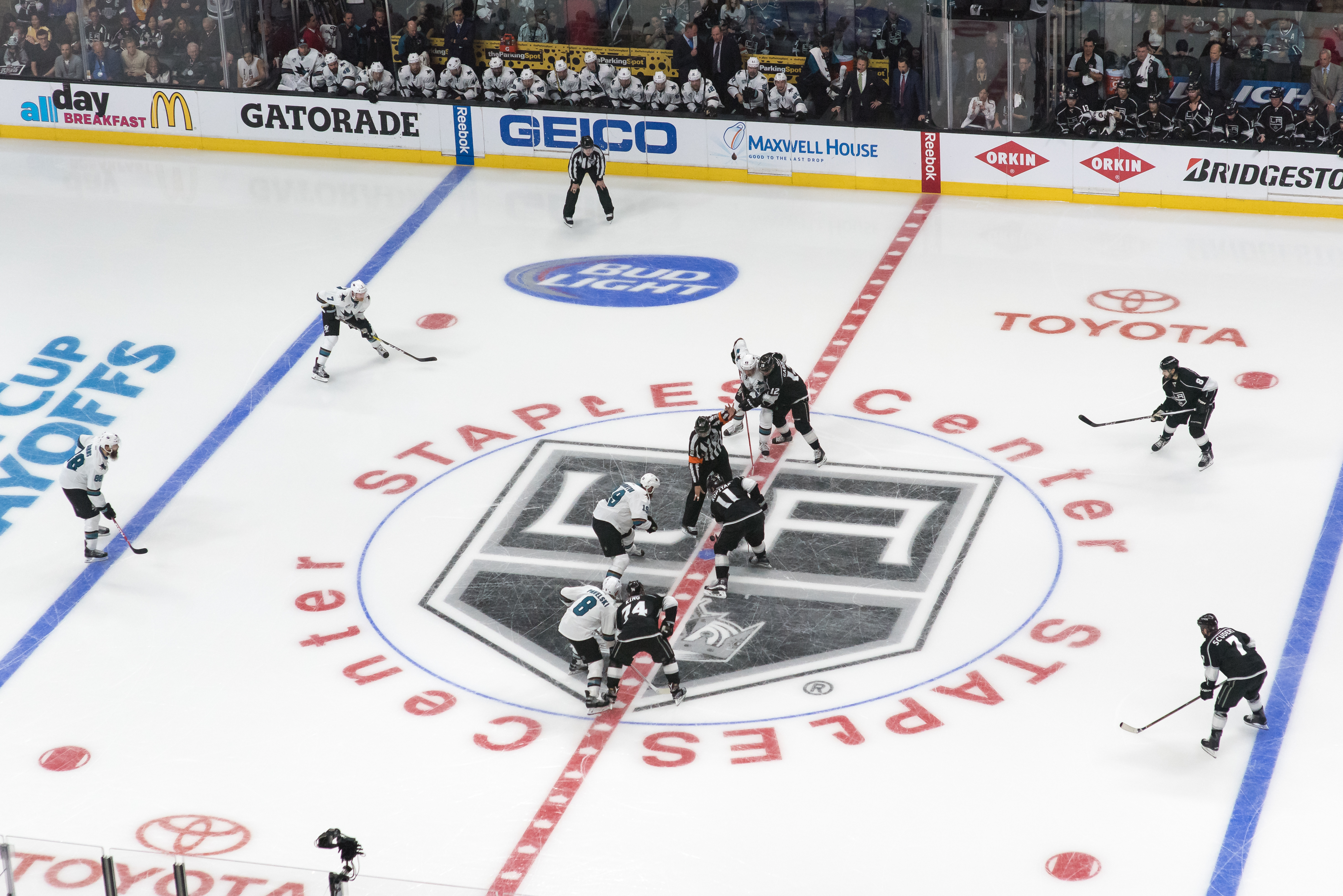 Sharks @ Kings